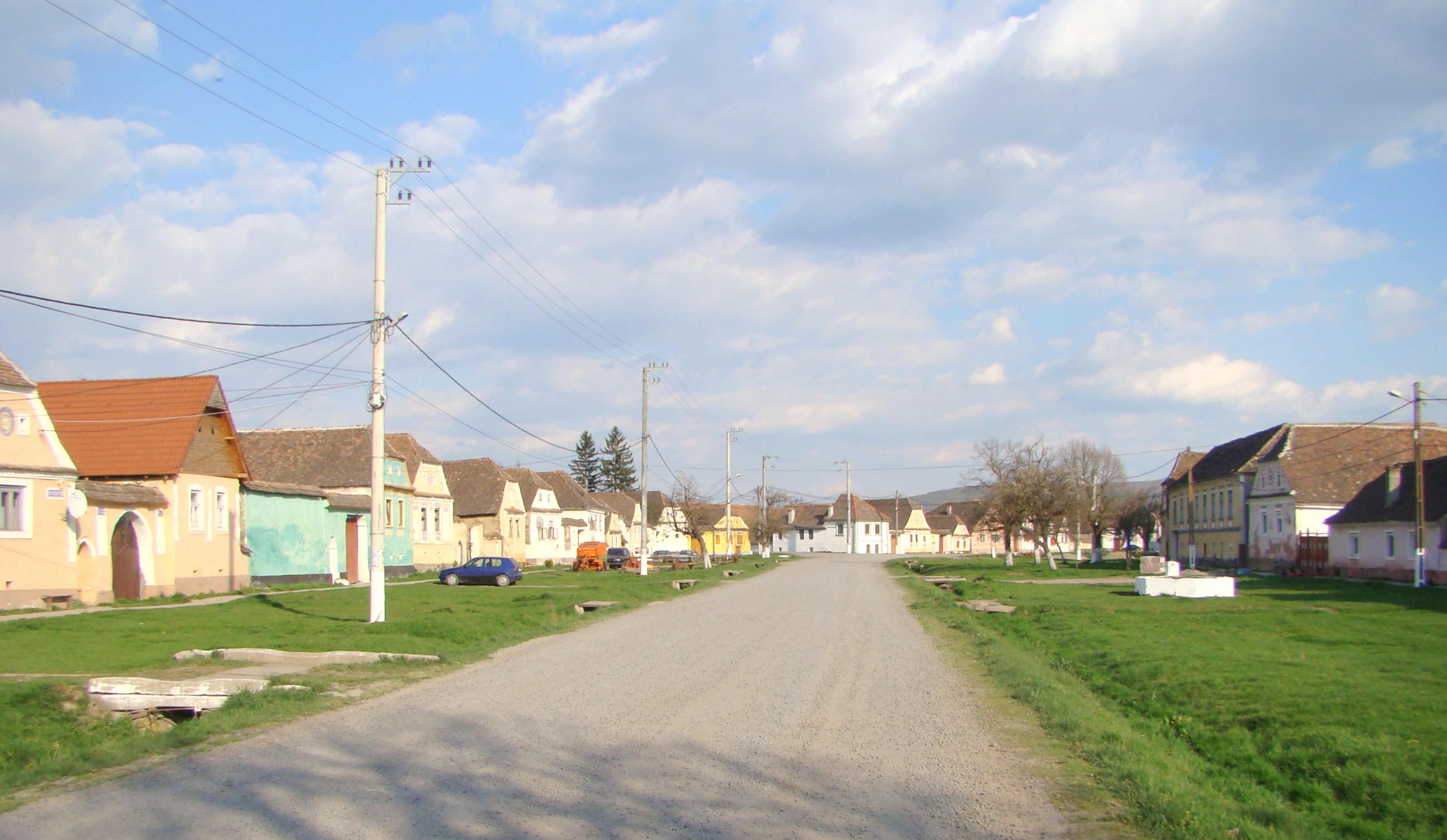 Ansamblul rural „Str. Principală”, sat Criț; comuna Bunești, str. Principală, ambele laturi ale străzii, între nr. 15 și 188. sec. XVIII - XIX